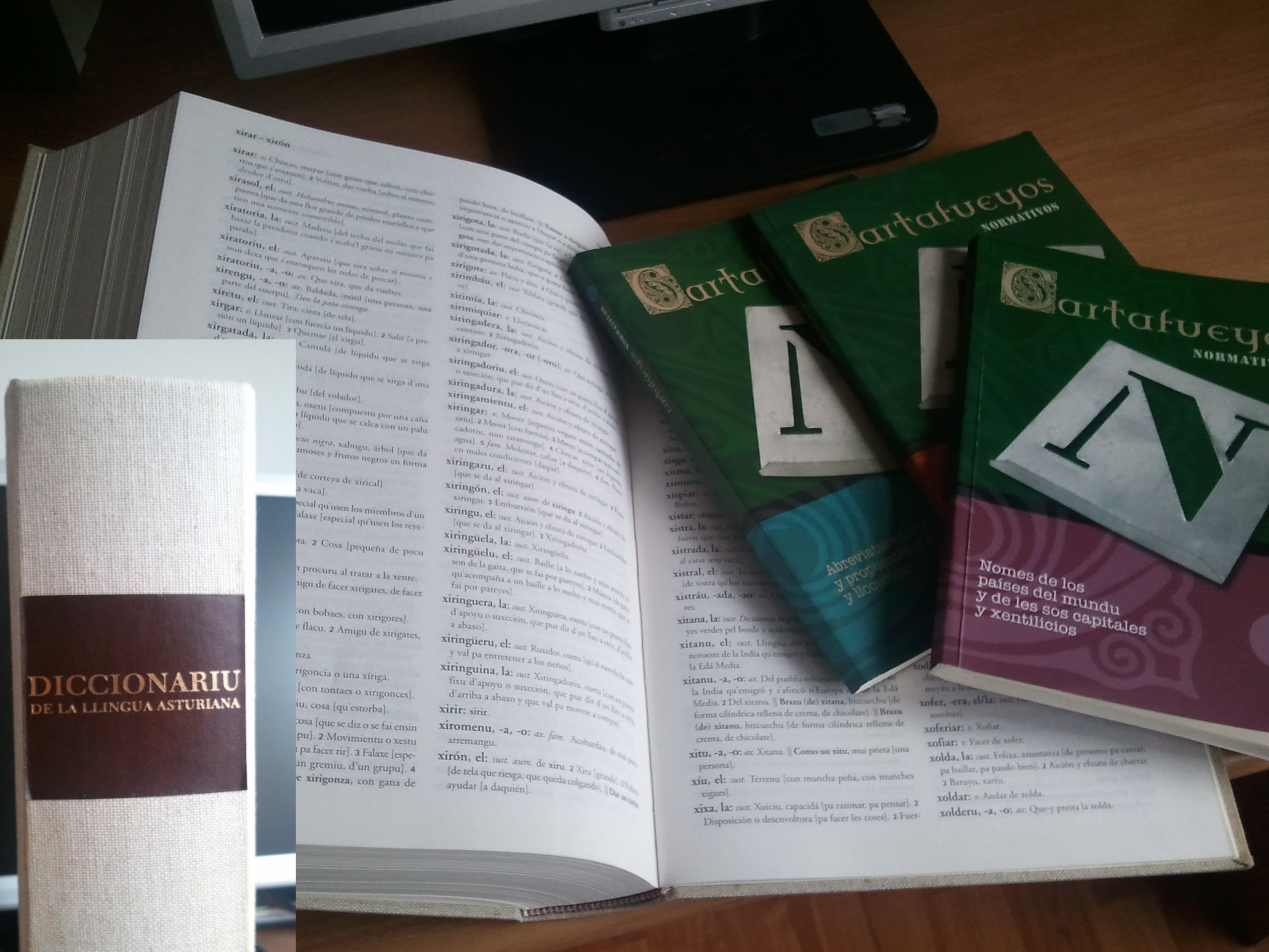 Diccionariu de Llingua Asturiana, y Cartafueyos Normativos. Academia de la Llingua